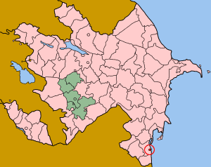 Map of Azerbaijan showing Lankaran (Lənkəran) sahar.